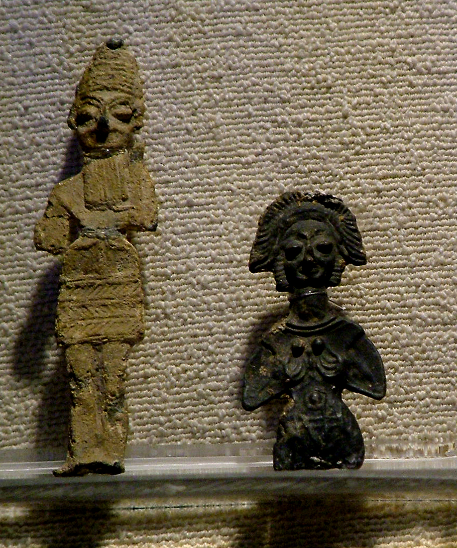 Isten kisplasztikák Kültepéből (Anatóliai Civilizációk Múzeuma, Ankara)